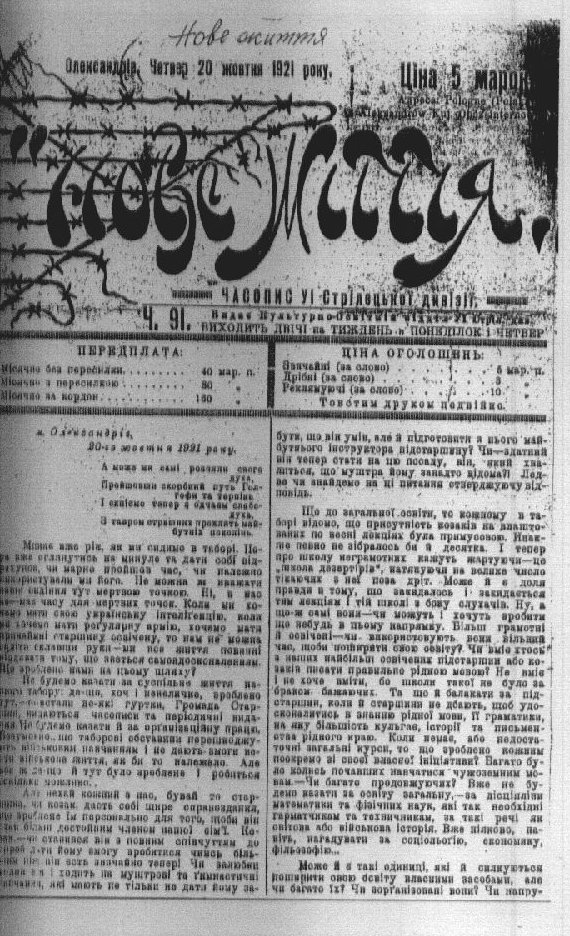 "Nowe żyttia" - gazeta wydawana przez internowanych wojskowych ukraińskich w Obozie Internowania nr 6 w Aleksandrowie Kujawskim